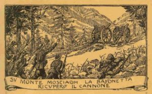 Autore sconosciuto. Risalente a prima del 1920.